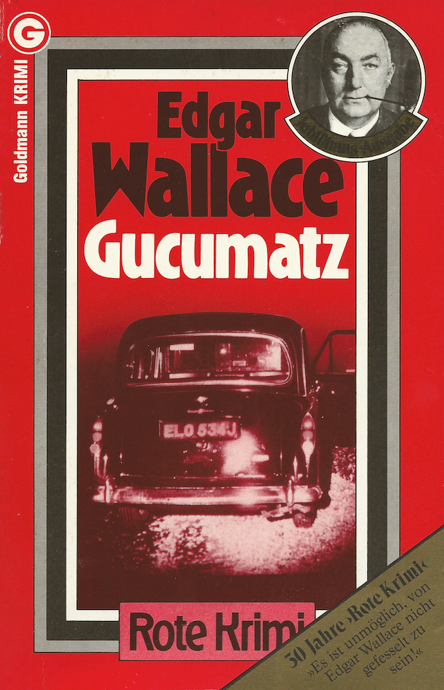 Edgar Wallace: Gucumatz. Goldmann Verlag, München, 1982. DNB